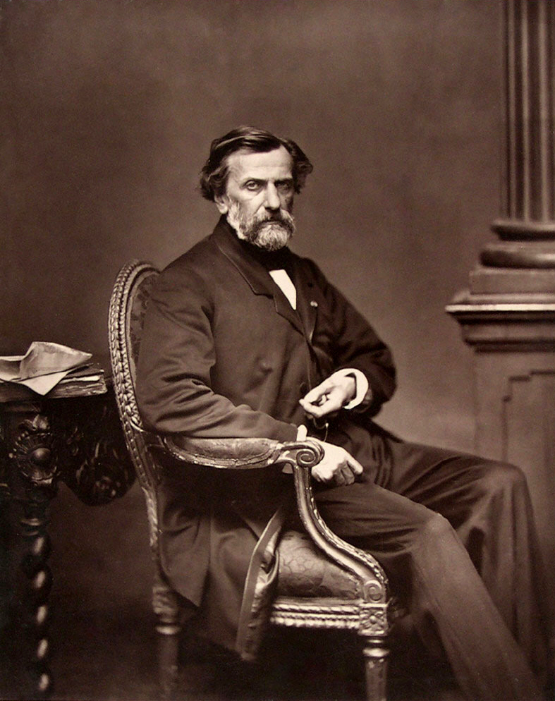 Antoine-Samuel Adam-Salomon (France, La Ferté-sous-Jouarre, Seine-et-Marne, 1818-01-08 - 1881) Ambroise Thomas, 1876-1884 Photograph, Woodburytype, 9 x 7 1/4 in. (22.86 x 18.4 cm)